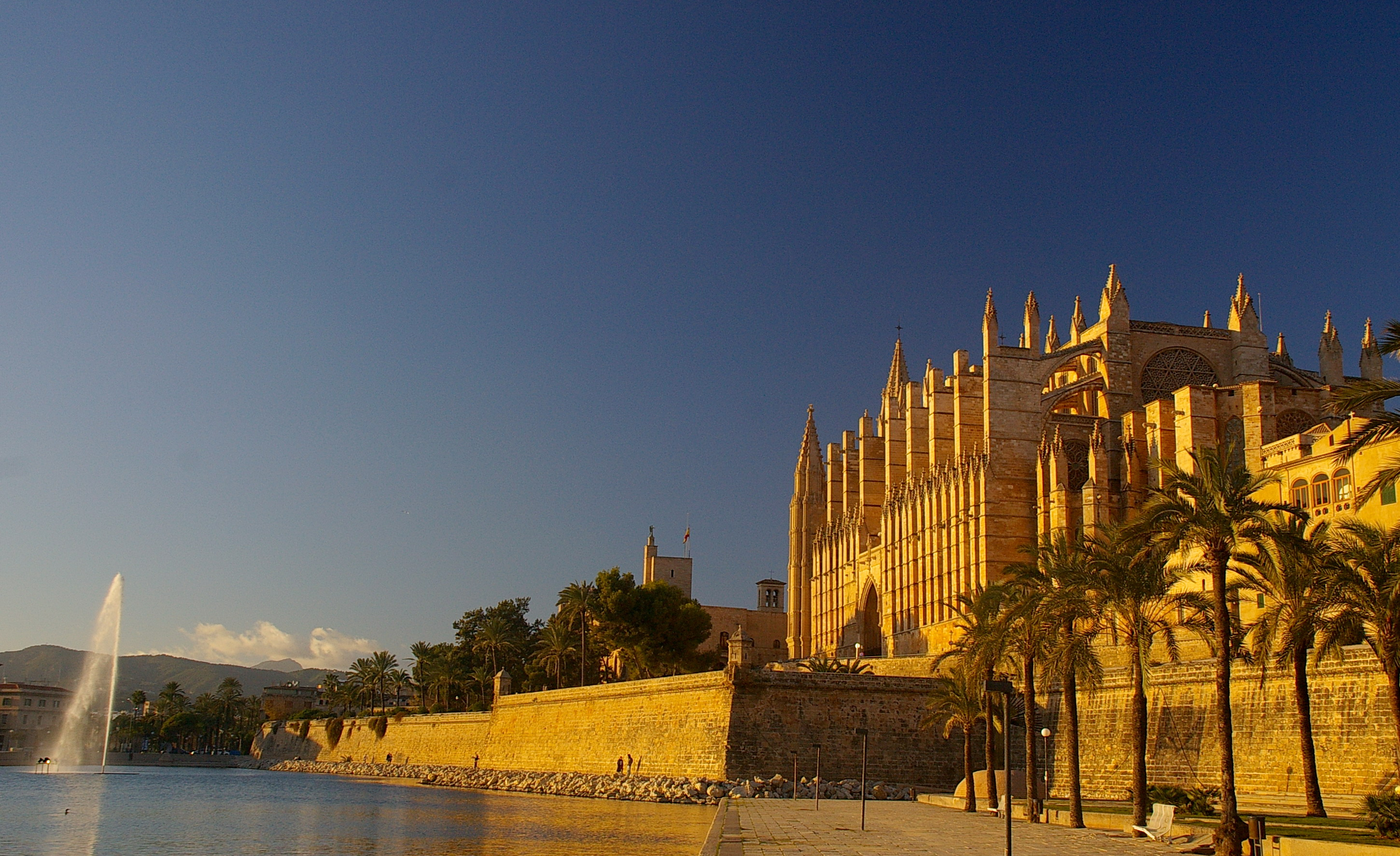 Seu de Mallorca (Palma)